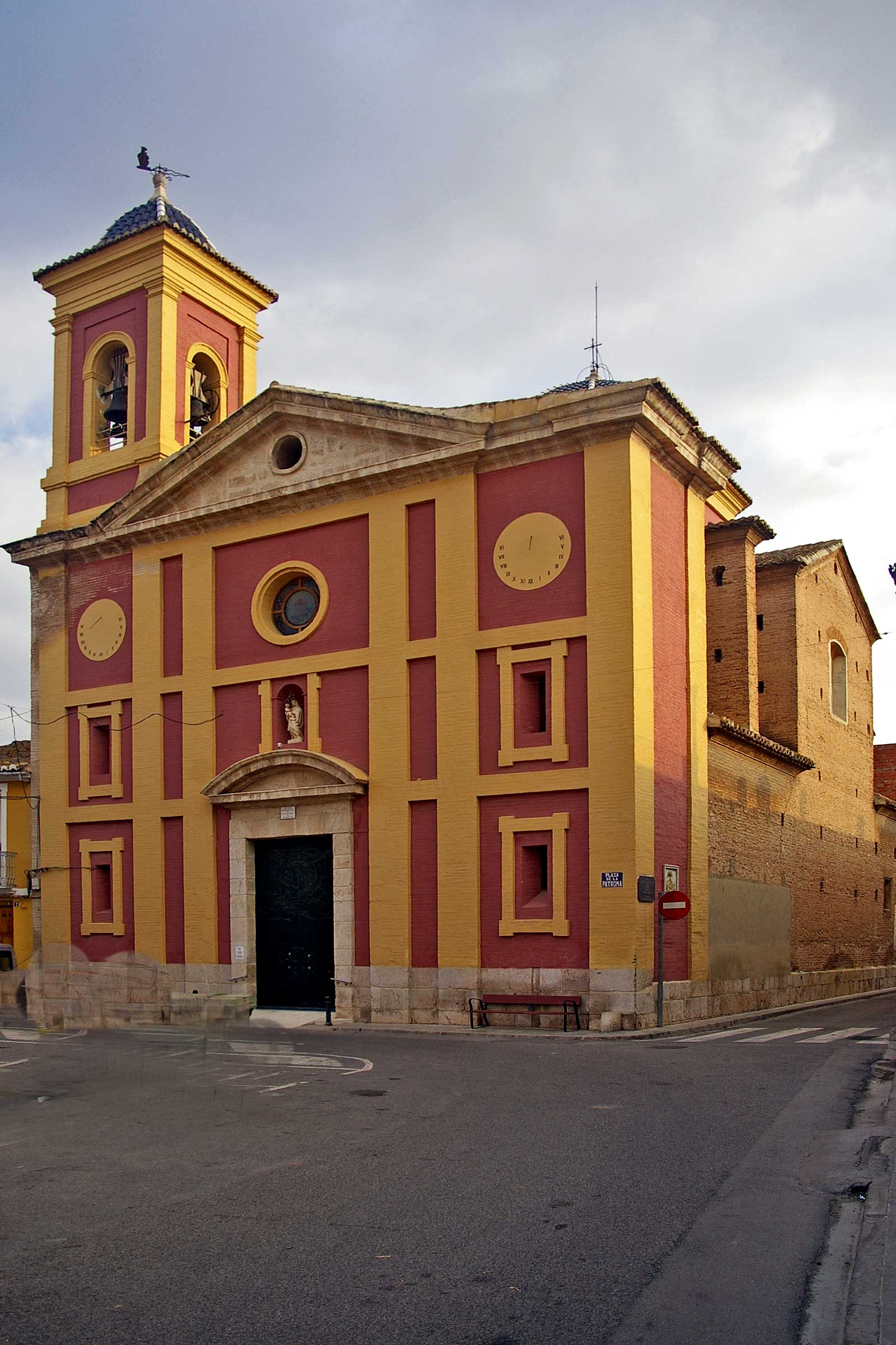 Església parroquial de Santa Anna, a Borbotó